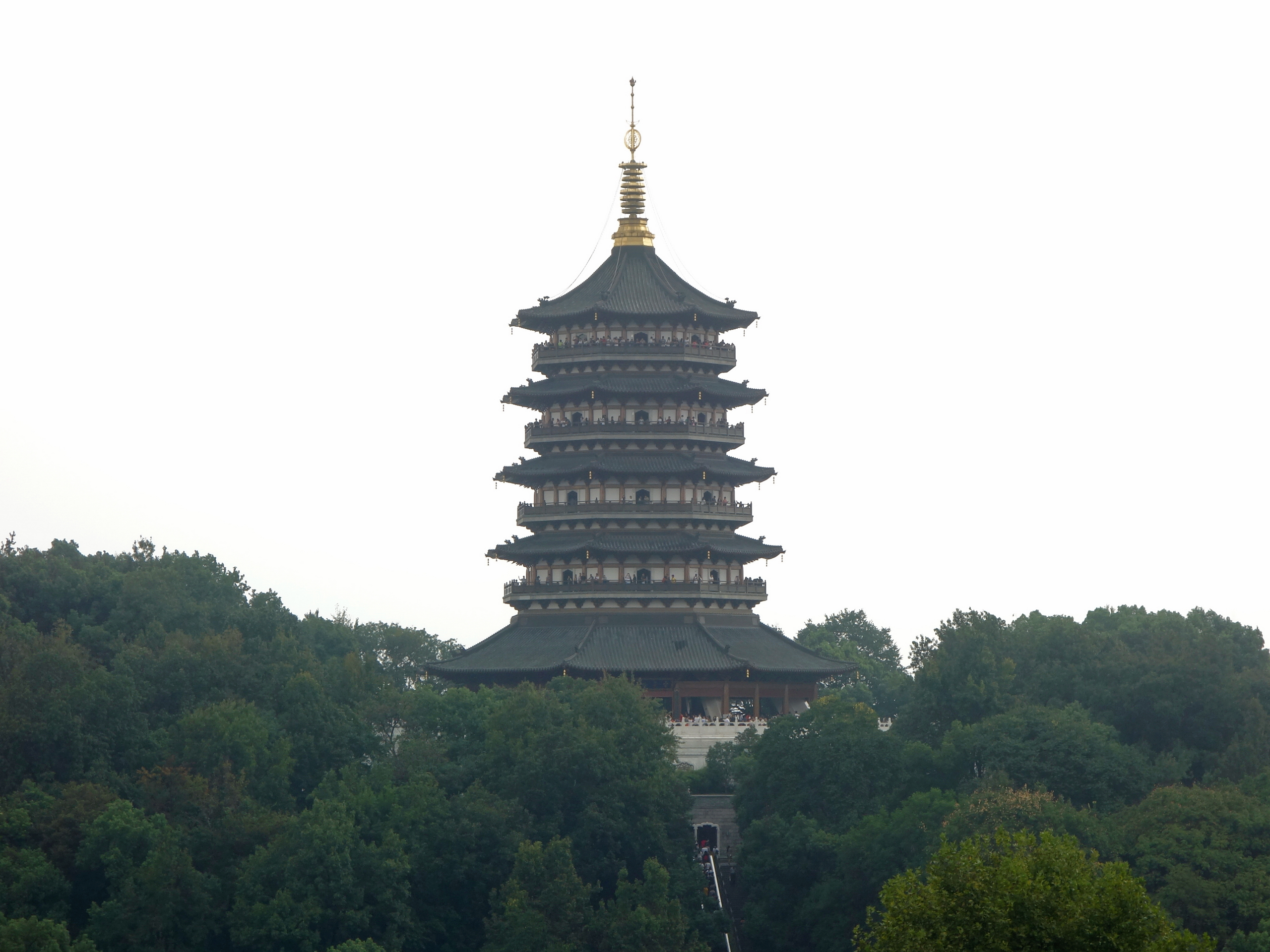 杭州西湖雷峰塔，“雷峰夕照”为西湖十景之一。